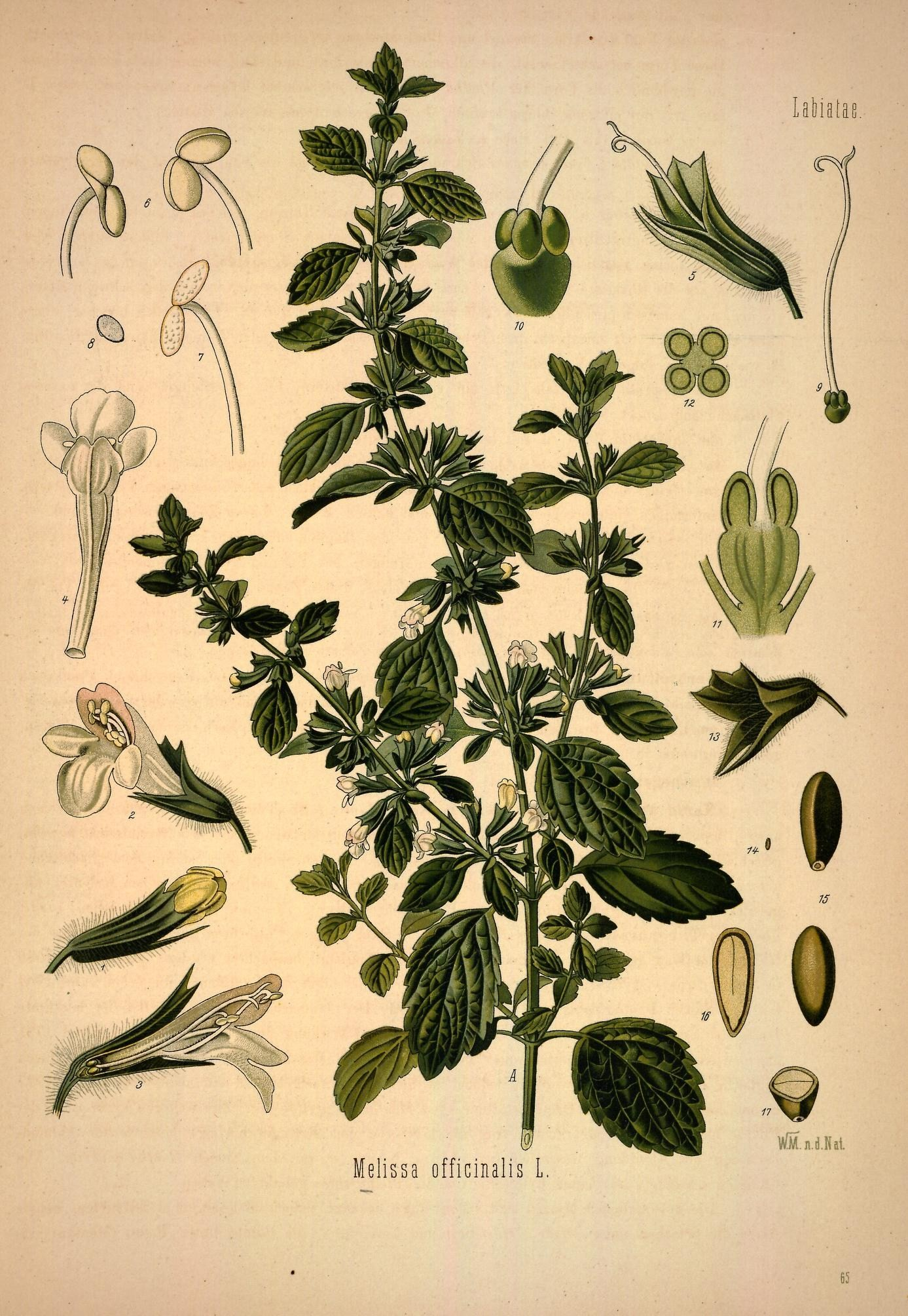 Zitronenmelisse. A blühender Zweig in natürl. Grösse; 1 und 2 geschlossene und geöffnete Blüthe, vergrössert; 3 dieselbe im Längschnitte, desgl.; 4 Blüthenkrone, desgl.; 5 Kelch mit Griffel, desgl.; 6 Staubgefässe, desgl.; 7 geöffnetes Staubgefäss, desgl.; 8 Pollen, desgl.; 9 Stempel, desgl.; 10 unterer Theil des Stempels mit Scheibe, stärker vergrössert; 11 derselbe im Längsschnitt, desgl.; 12 derselbe in Querschnitt, desgl.; 13 Fruchtkelch, desgl.; 14 und 15 Nüsschen natürl. Grösse und vergrössert; 16 und 17 dasselbe im Längs- und Querschnitt, vergrössert.